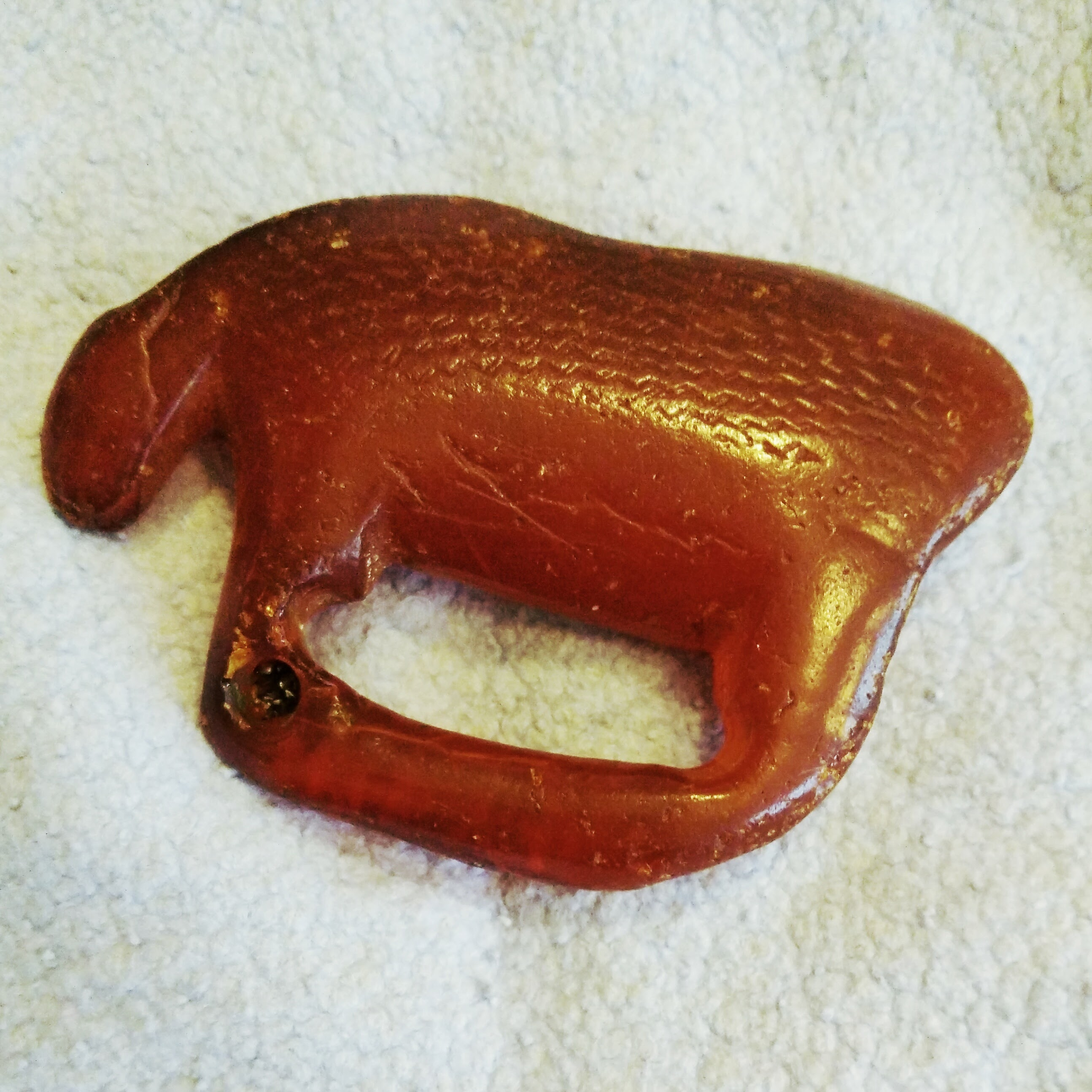 Elgfigur fundet i 2015 ved Næsby Strand.